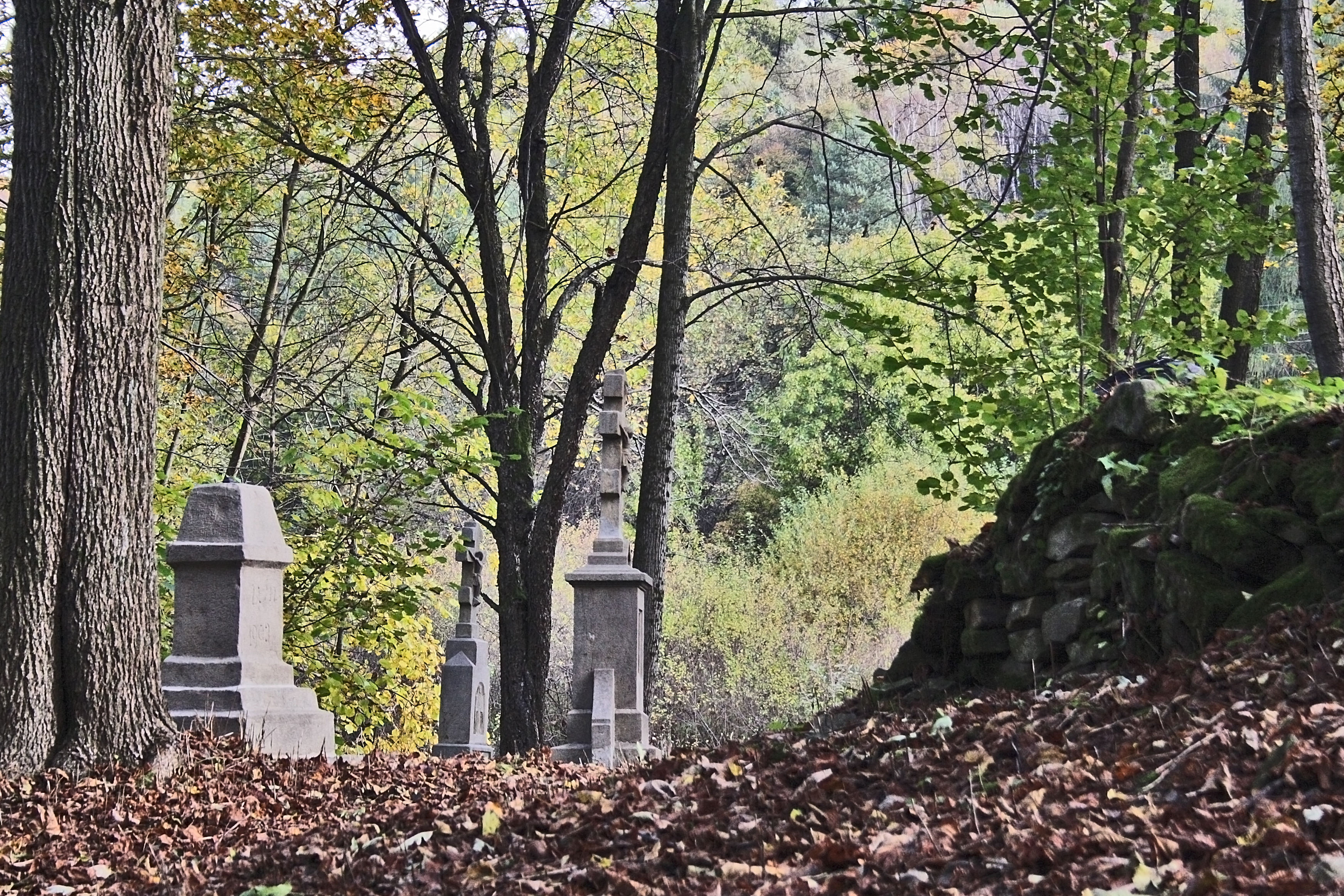 Specjalny obszar ochrony siedlisk Ostoja Magurska. This is a photography of Natura 2000 protected area with ID PLH180001